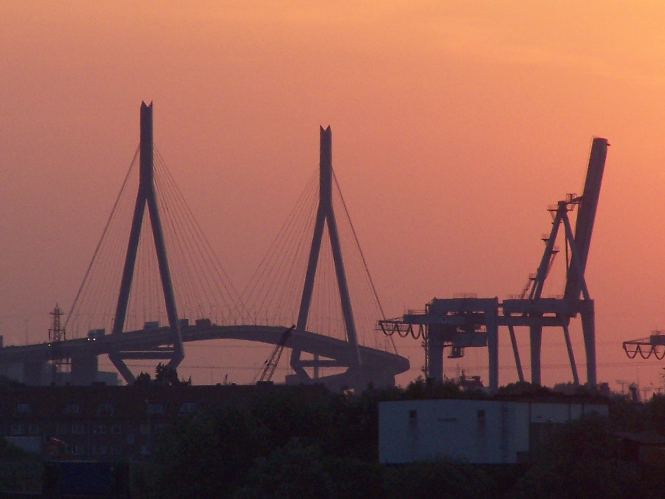 Die Köhlbrandbrücke am Abend